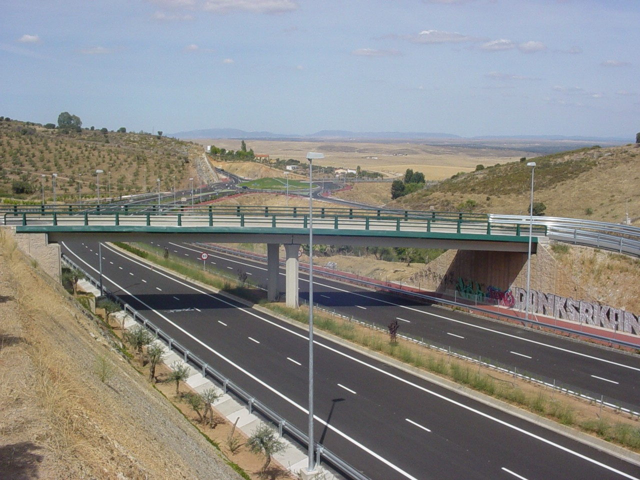 Ronda Norte de Cáceres. Panorámica zona Glorieta de intersección con la carretera del Casar de Cáceres.